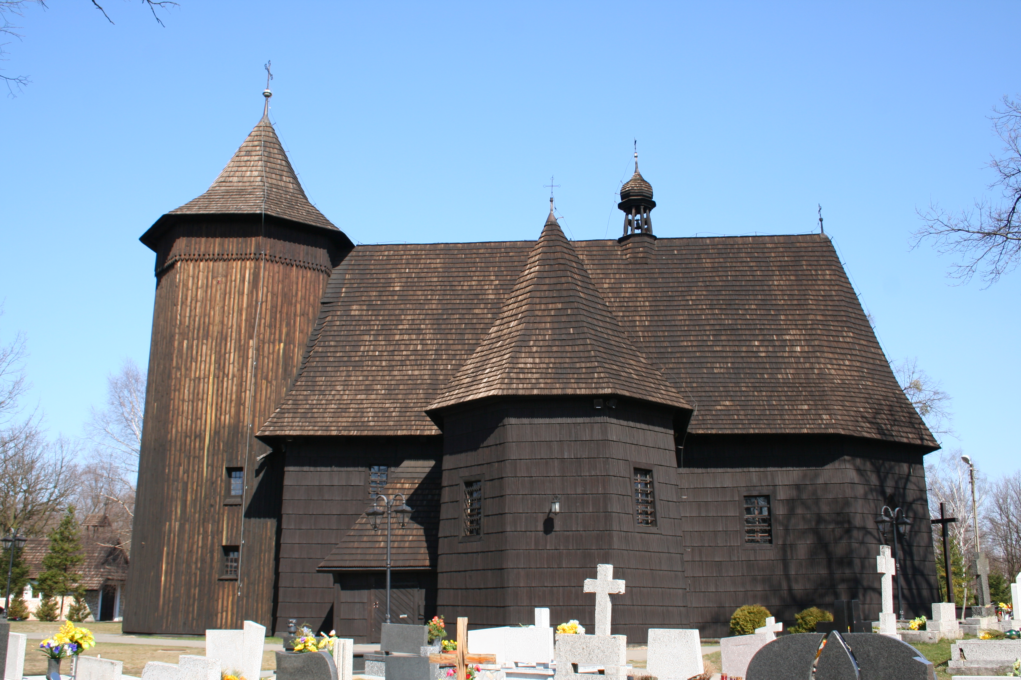 Kościół parafialny pod wezwaniem NMP Królowej Różańca Świętego w Boronowie, powiat lubliniecki, województwo śląskie